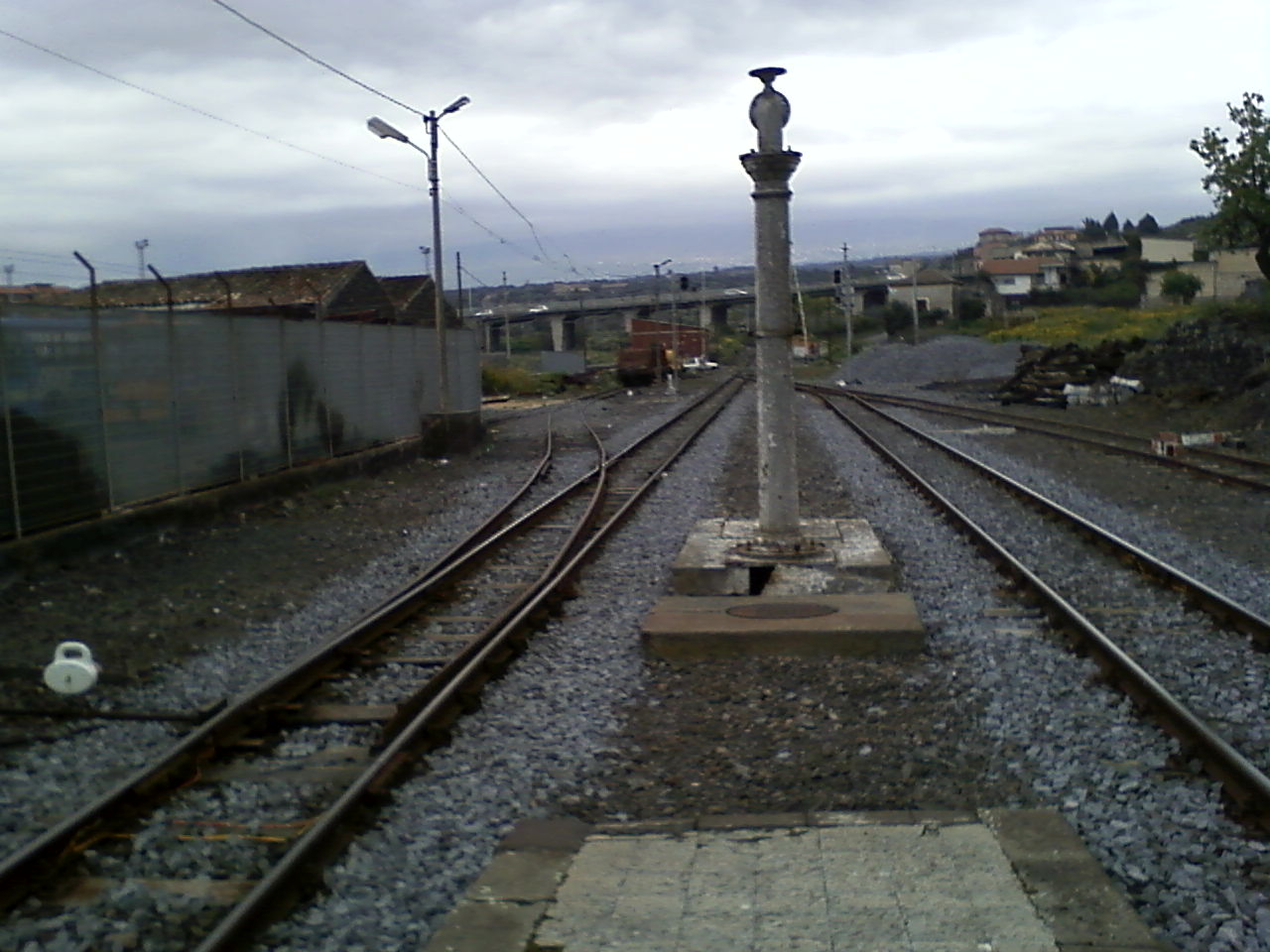 piazzale nord e merci della stazione di Paternò della Ferrovia Circumetnea